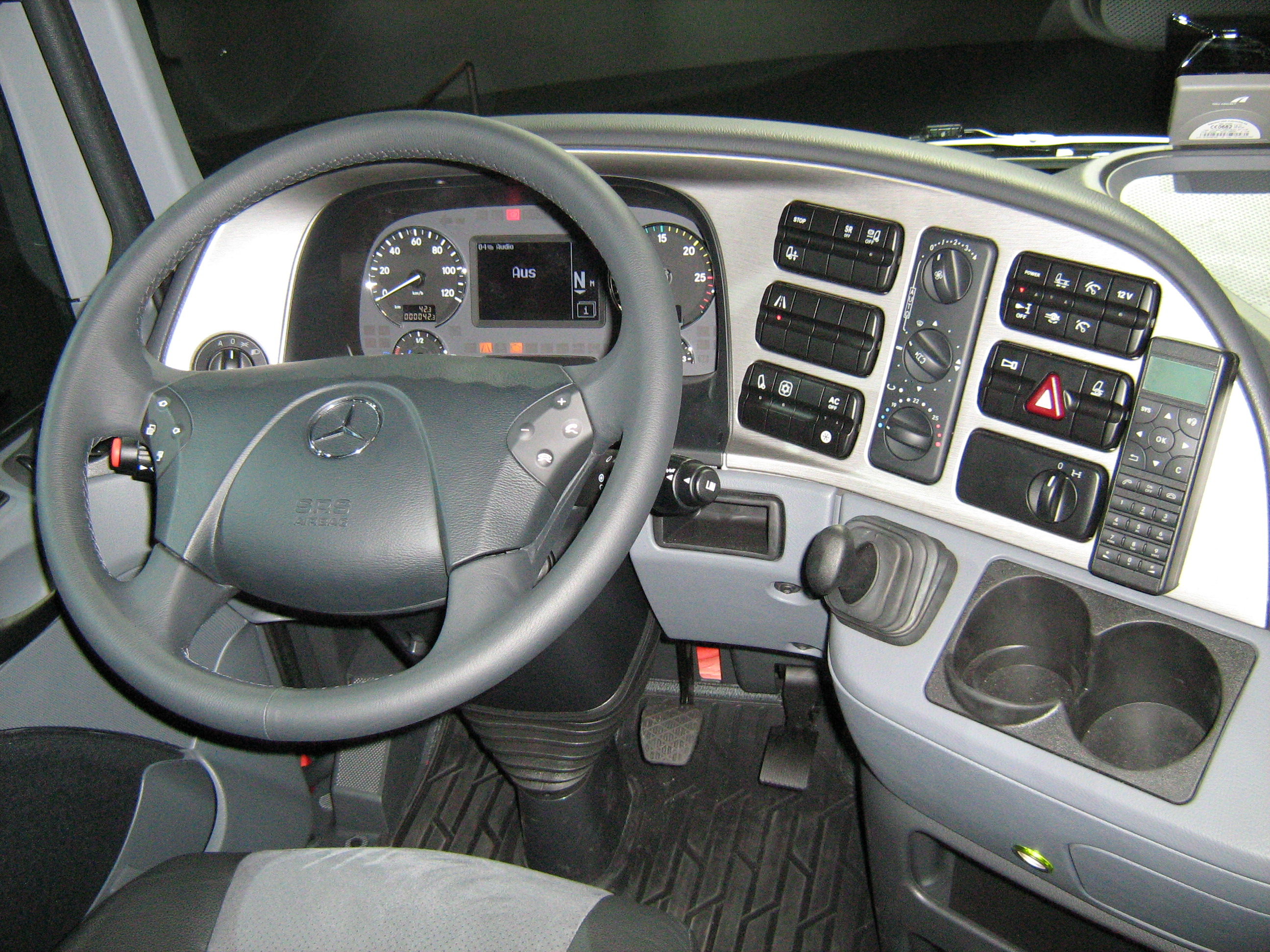 Mercedes-Benz LKW Lenkrad